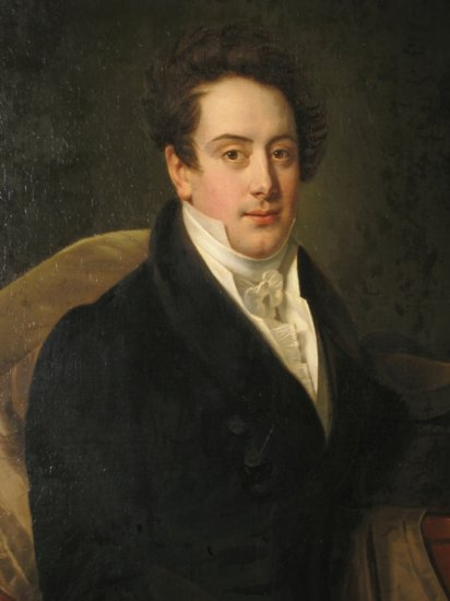 Граф Лев Северинович Потоцкий (1789 - 1860) - действительным тайным советником, член Государственного Совета.